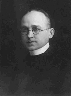 Ferdinand Chýlek (1888 - 1941), Český římskokatolický kněz a politik.